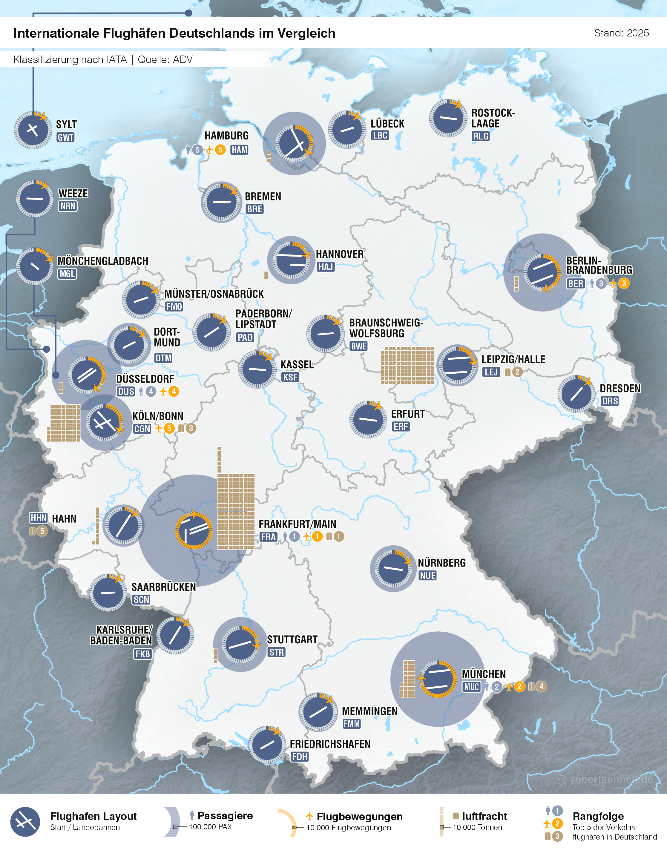 Internationale Flughäfen Deutschlands im Vergleich